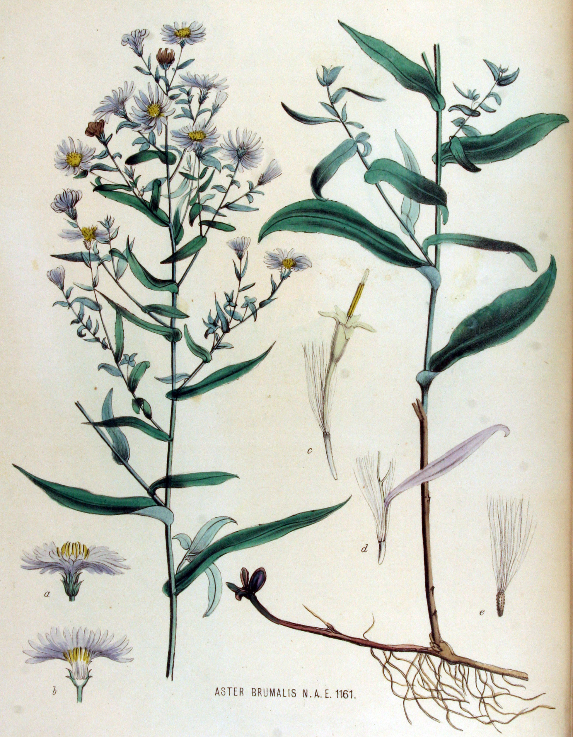 Symphyotrichum novi-belgii (L.) G. L. Nesom (Syn. Aster brumalis Nees)